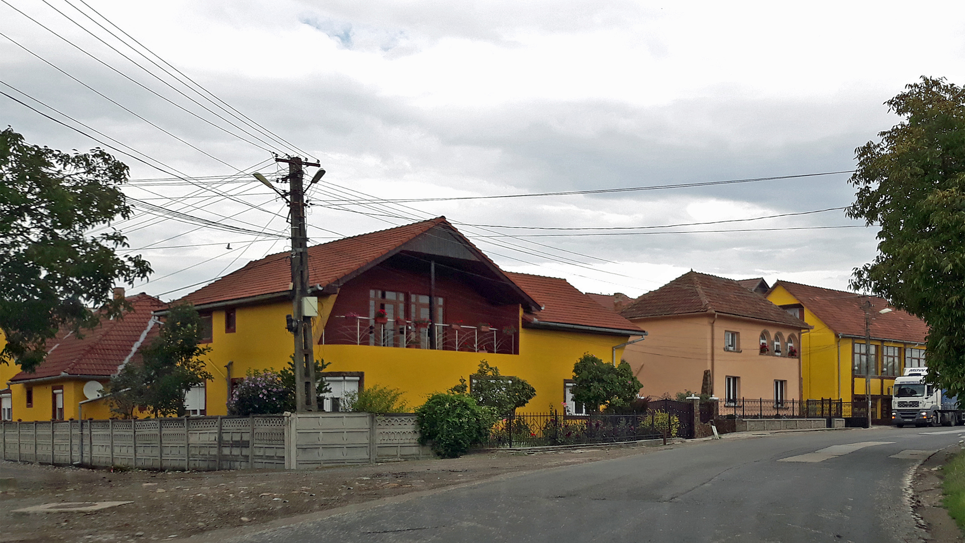 Село Хелмаджу, Румыния, лето 2018 года